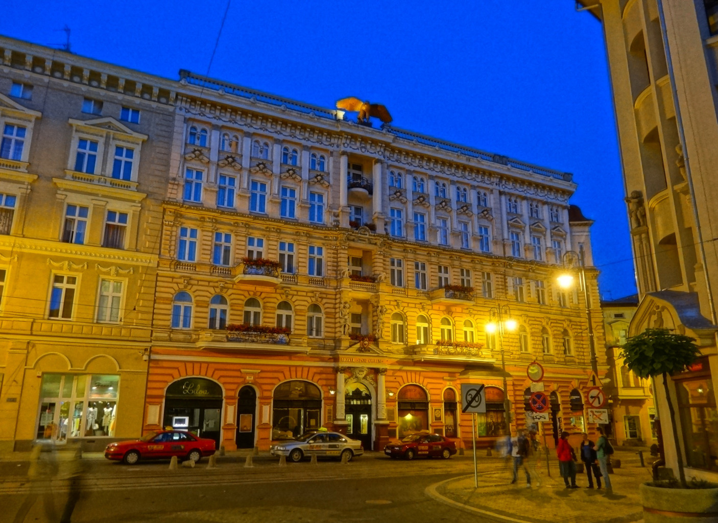 Hotel Pod Orłem w Bydgoszczy przy ul. Gdańskiej 14 (zbud. 1896, Józef Święcicki)